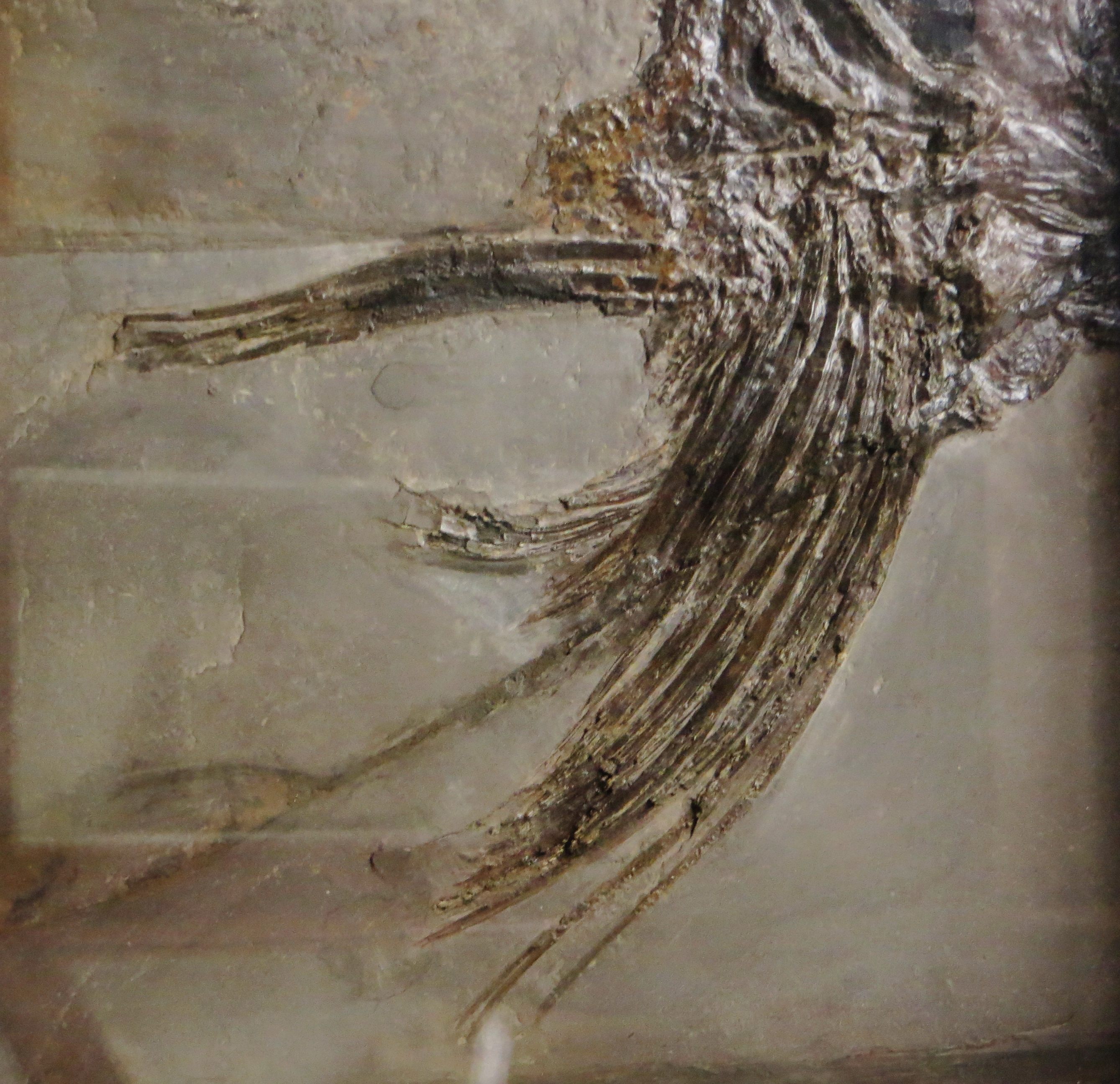 Fossil of Pachycormus- Took the picture at Teylers Museum, Haarlem